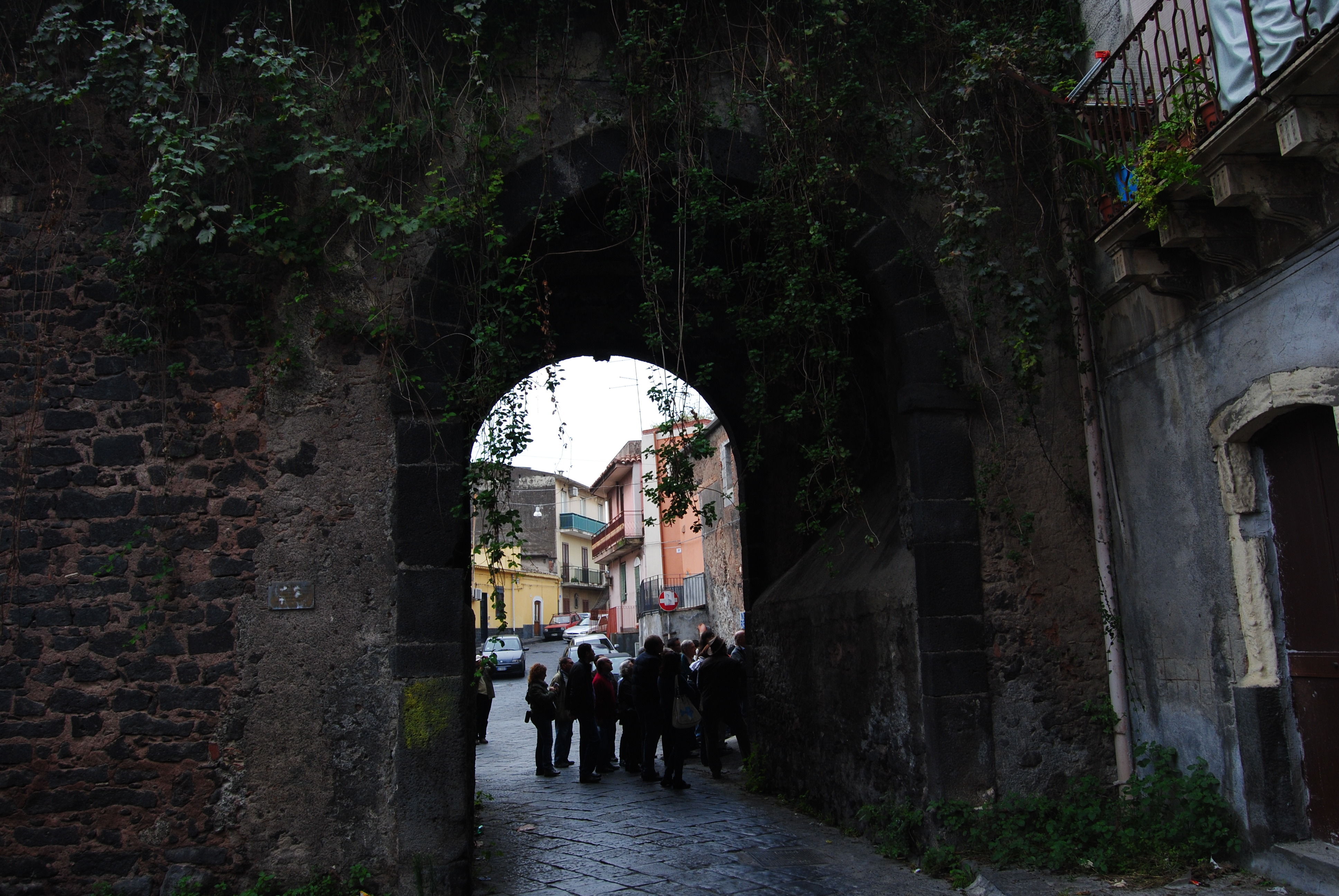 Porta del Fortino vecchio, già Porta di Ligne, eretta nel 1672, vista da via Sacchero (lato nord-est).